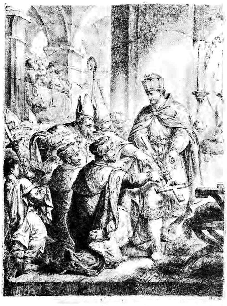 Rudolph nimmt statt des Zepters zum Huldigungseide das Crucifix (Bernhard Rode, 1782). “Da ihm die deutschen Fürsten den Huldigungseid ablegen sollten, um zugleich von ihm mit ihren Ländern und Rechten belehnt zu werden, weigerten sich einige derselben es zu thun, weil kein Scepter vorhanden war, auf welches der Eid geleistet zu werden pflegte. Rudolph ergriff sogleich ein Crucifix, als ein noch ehrwürdigeres Zeichen zwischen ihm und den Fürsten, reichte ihnen solches, indem er es küsste, mit der Erinnerung dar, wie viel sie alle demjenigen zu verdanken hätten, welchen es vorstellte, und sie machten keine Schwierigkeiten, ihm darüber ihre Treue zu schwören.” Schröckh, Bd. III, S. 487, zitiert nach Kunst im Dienste der Aufklärung. Radierungen von Bernhard Rode, S. 47.